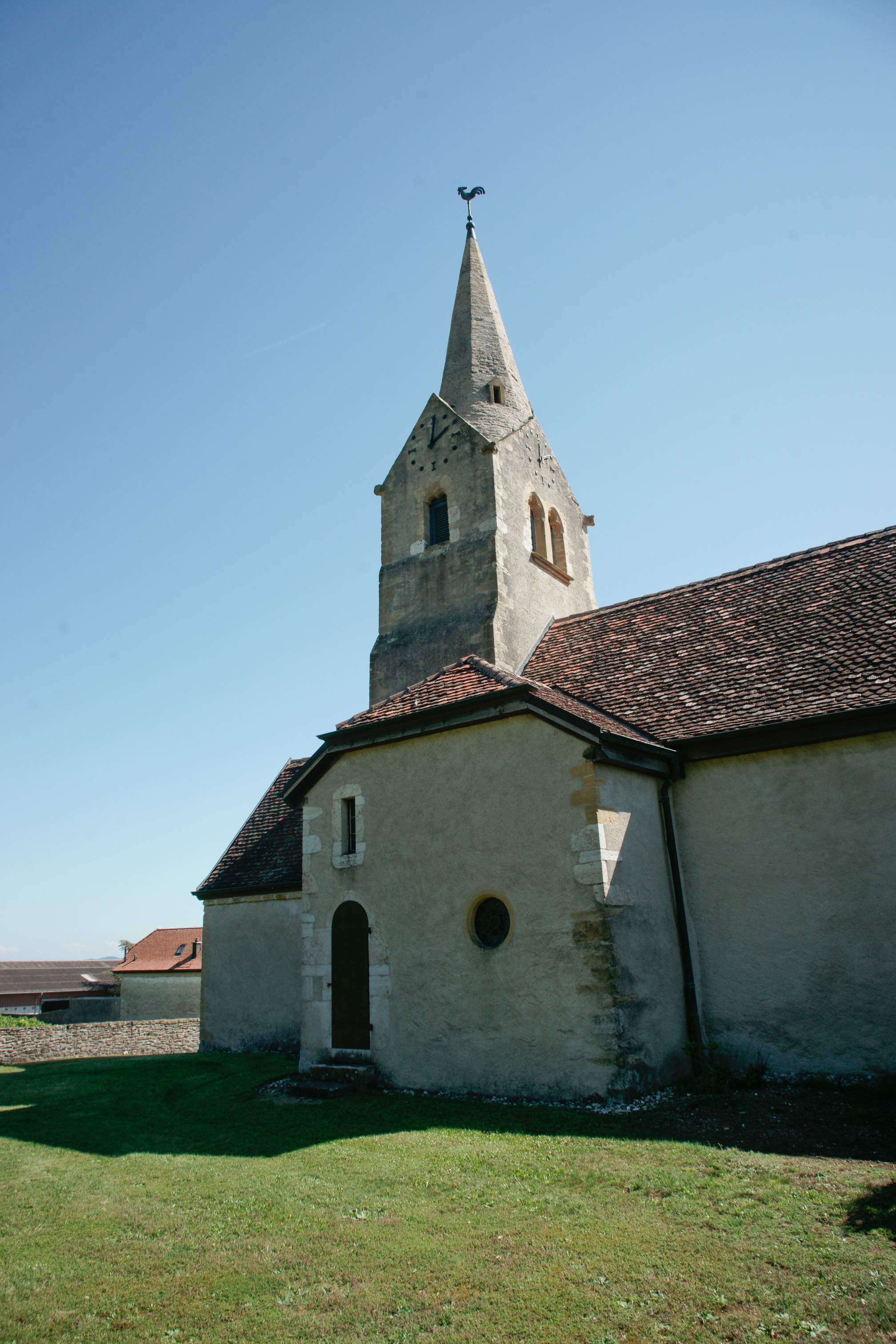 Clocher de l'église de Bonvillars